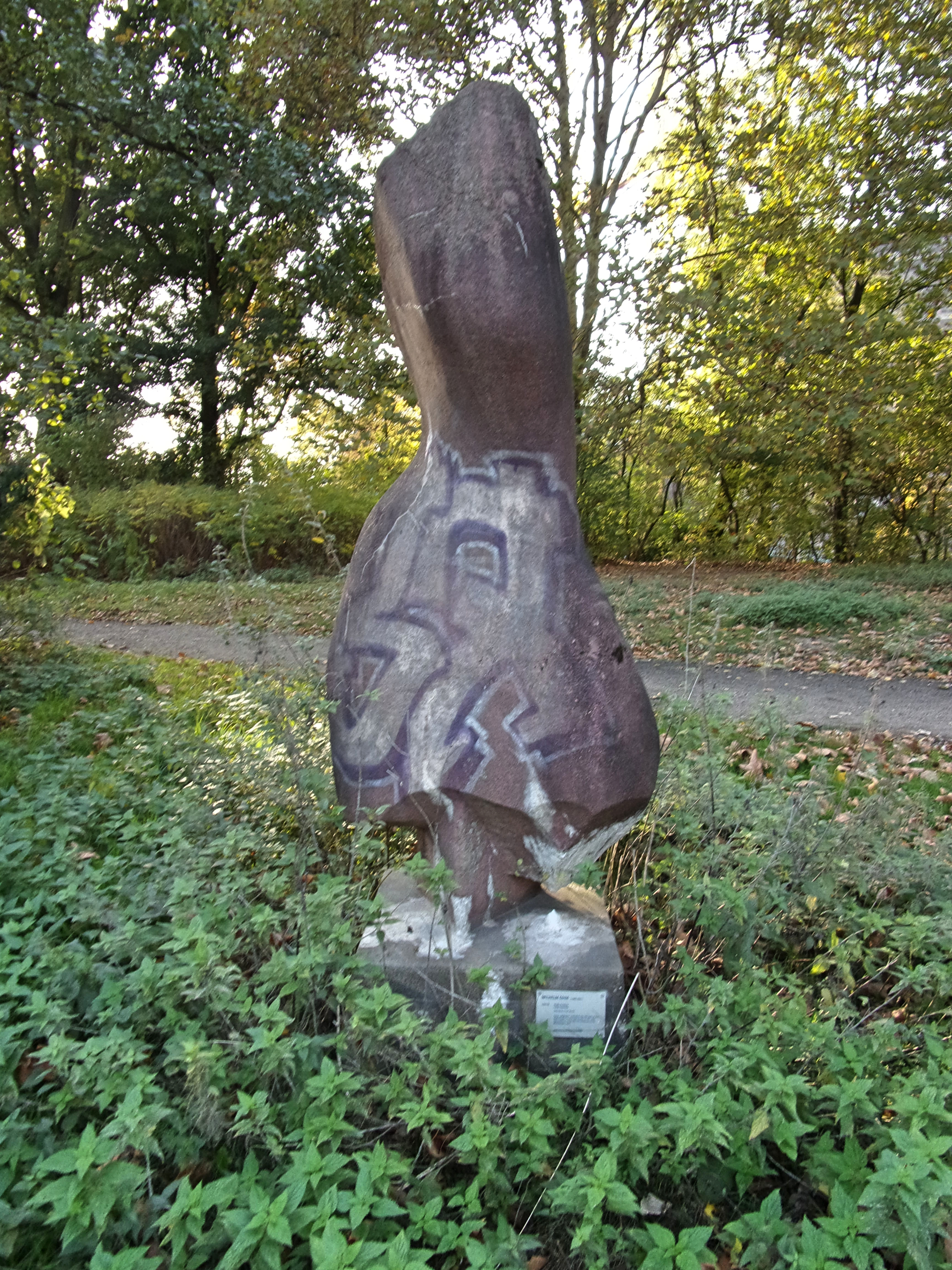 Skulptur " Große Panthea " von Wilhelm Ohm, 1961-1962, Steinguss. Laut Plakette wurde die Skulptur anlässlich der IGA 1963 in den Wallanlagen aufgestellt, jetziger Standplatz Thörls Park in Hamburg-Hamm. Foto der Plakette in dieser Kategorie. Wilhelm Ohm, 1905-1965